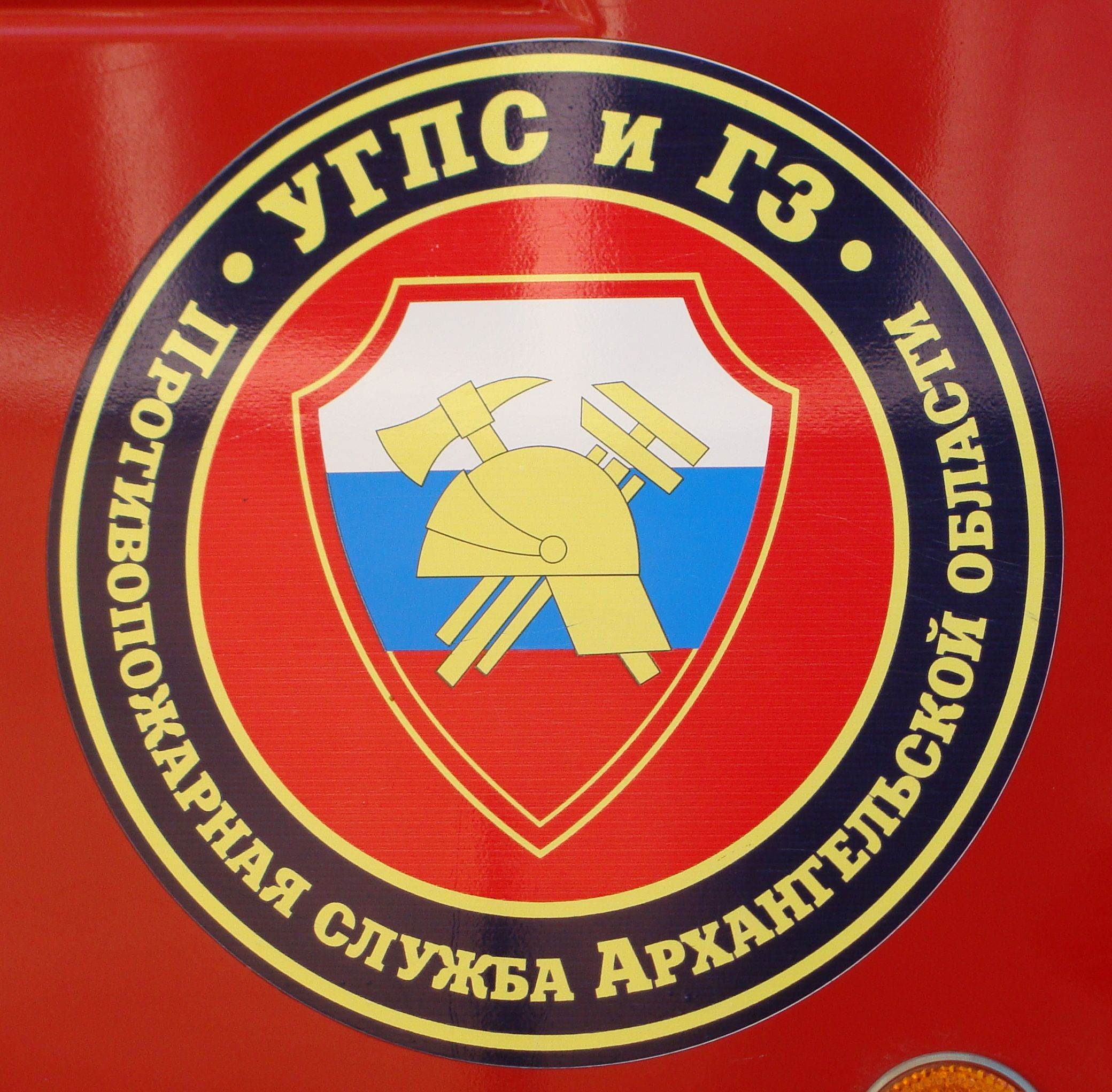 Эмблема противопожарной службы Архангельской области